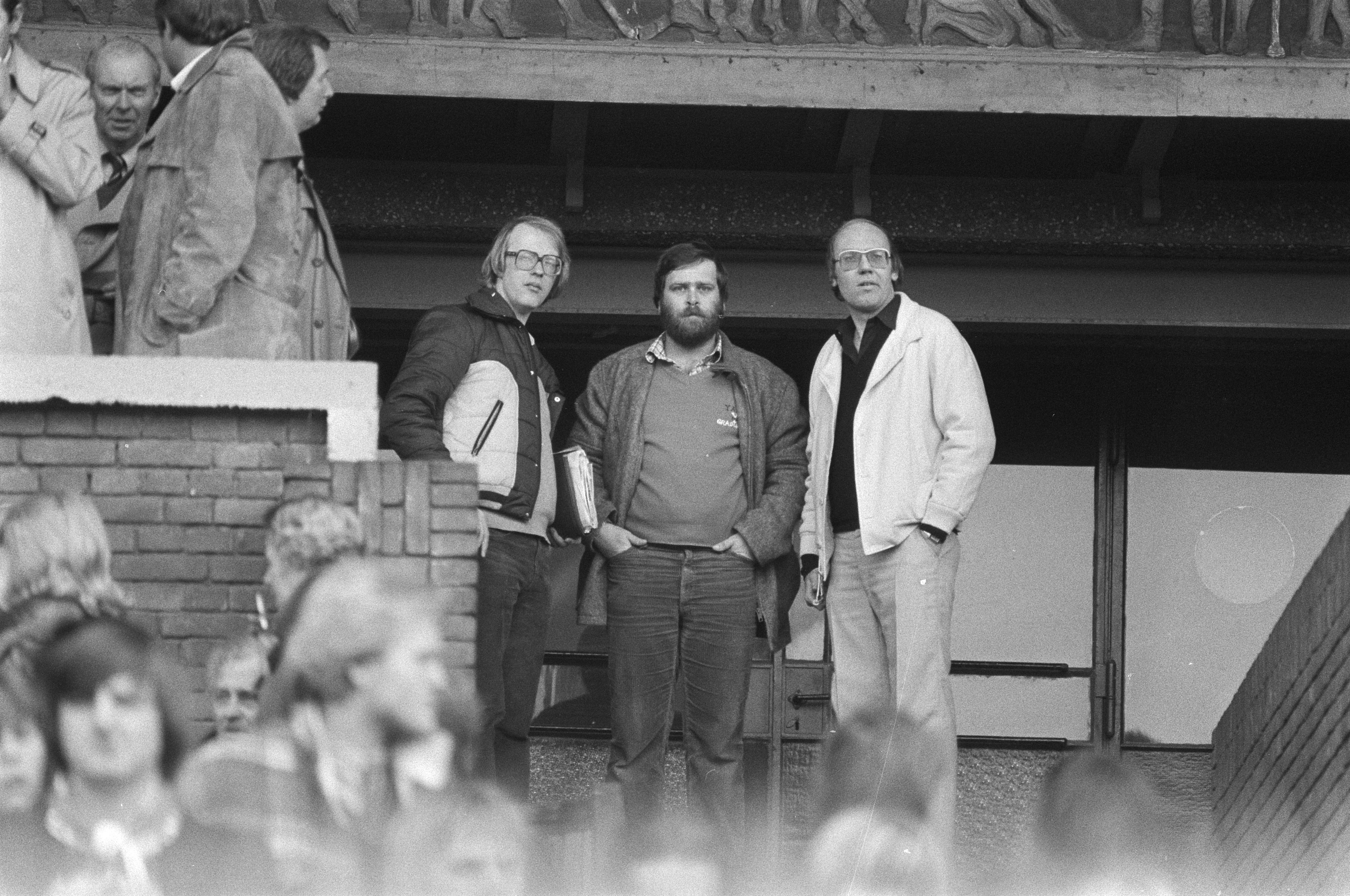 Collectie / Archief : Fotocollectie Anefo Reportage / Serie : [ onbekend ] Beschrijving : Ajax tegen Feijenoord 1-1; op de tribune de NOS commentatoren Eddy Poelman (links) en Kees Jansma Datum : 9 maart 1980 Trefwoorden : sport, tribunes, voetbal Instellingsnaam : Feyenoord Fotograaf : Suyk, Koen / Anefo Auteursrechthebbende : Nationaal Archief Materiaalsoort : Negatief (zwart/wit) Nummer archiefinventaris : bekijk toegang 2.24.01.05 Bestanddeelnummer : 930-7137